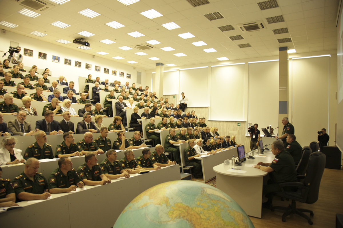 Заместитель Министра обороны Российской Федерации — начальник Главного военно-политического управления Вооруженных Сил Российской Федерации генерал-полковник Андрей Картаполов на лекции в Военном университете Министерства обороны РФ.